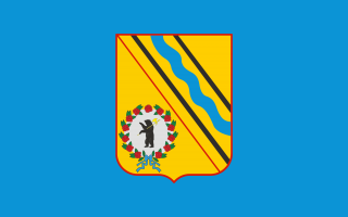 флаг города Тутаева